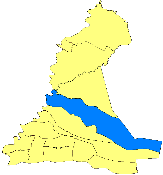 Mapa de Tacuaras, Paraguay.